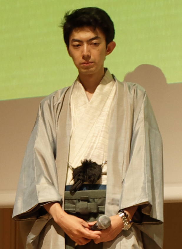 2018年10月2日 第66期王座戦五番勝負第3局 対局終了後の中村太地王座。